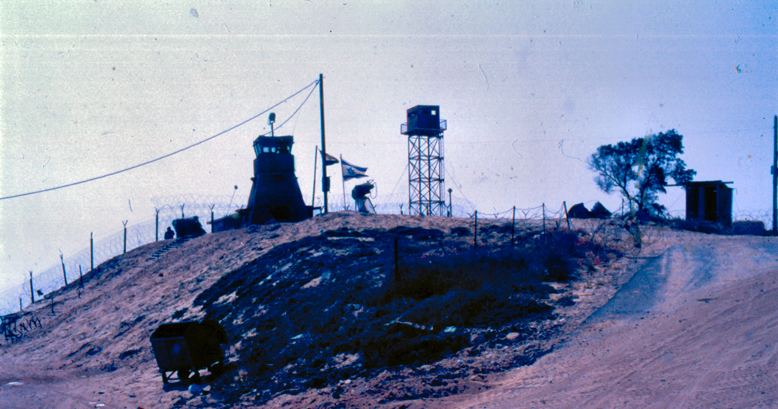 Muzav_aluf